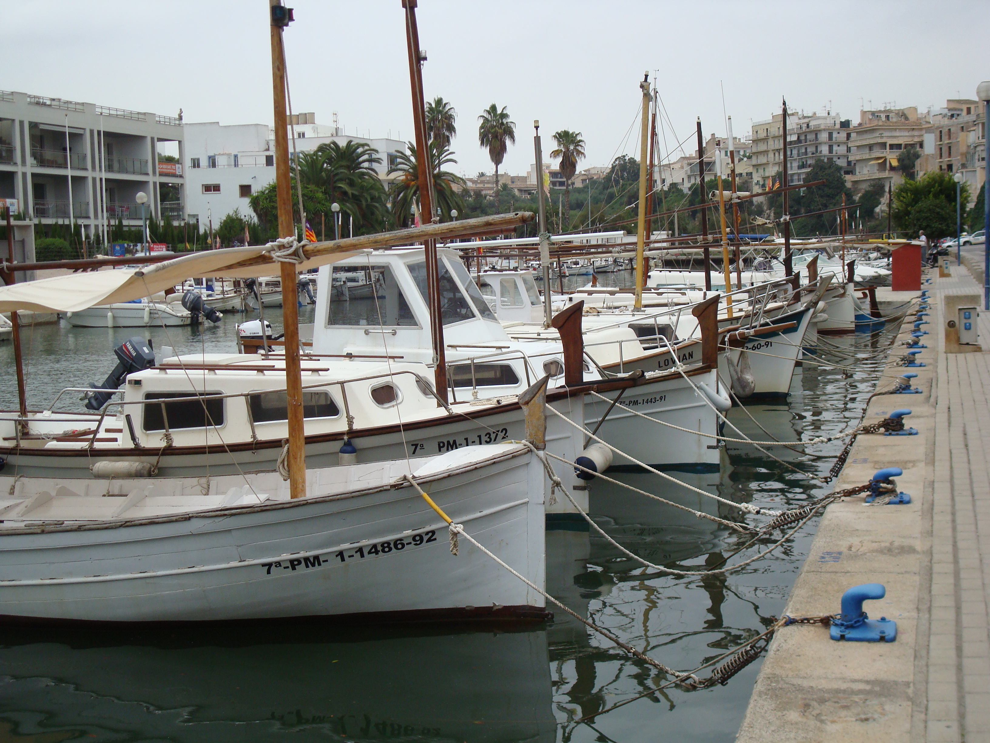 le port de pêche